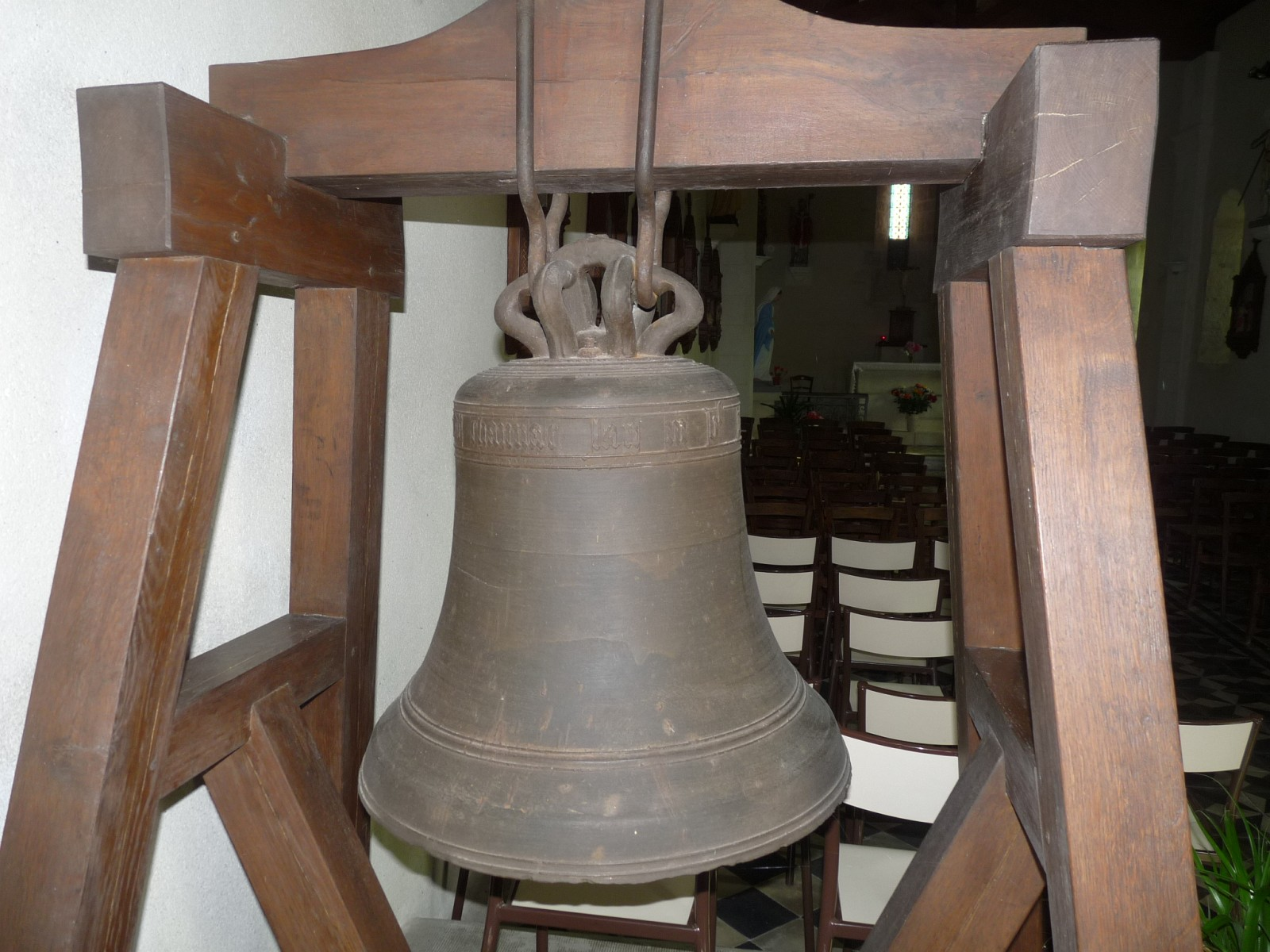 Cloche de 1546 (classée MH), église de Chaunac, Charente-Maritime, France